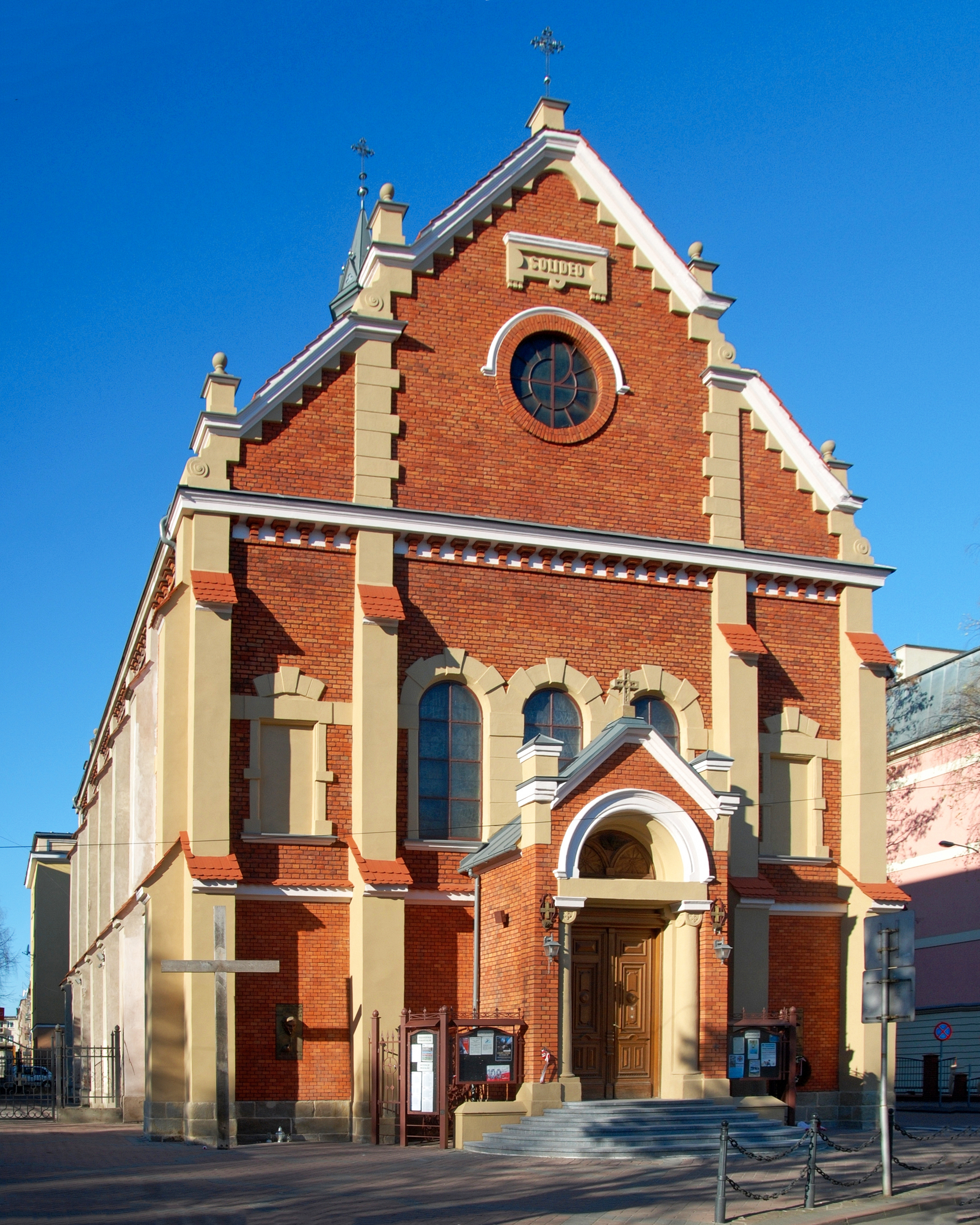 miasto Jasło